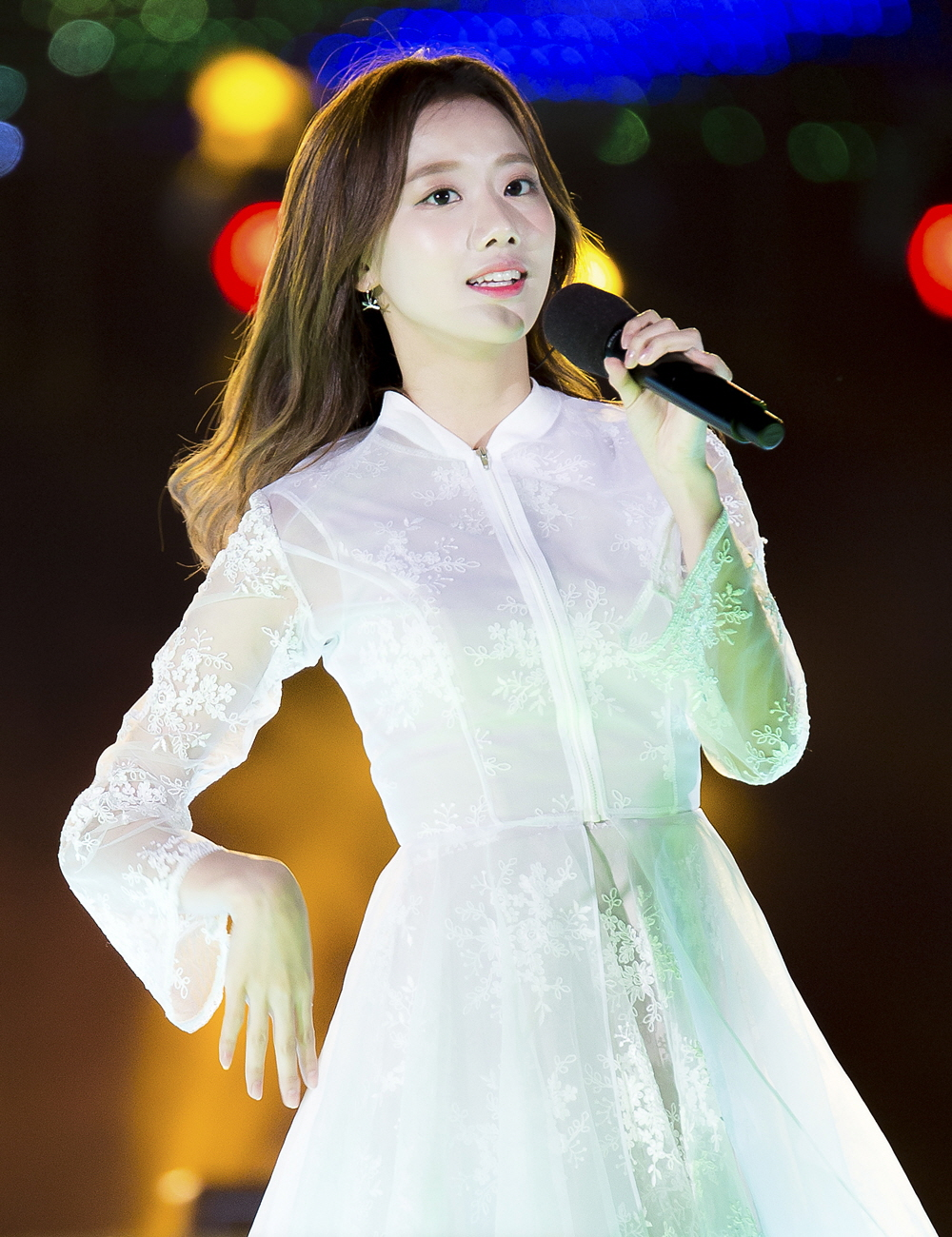 170428 김해도민체육대회 1